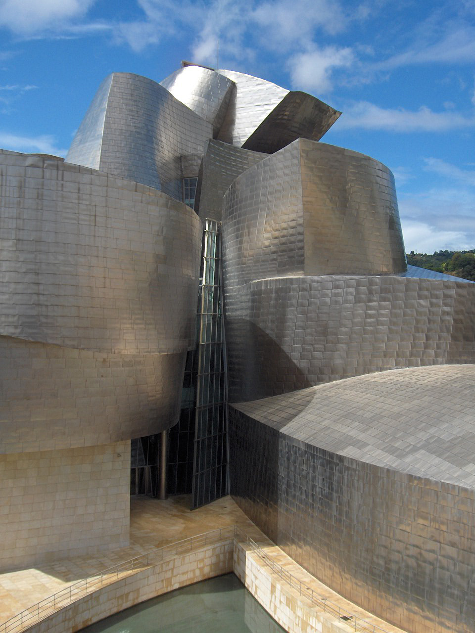 Guggenheim museum in Bilbao, Spain